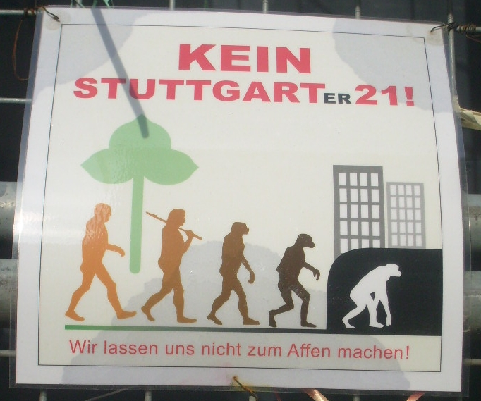 Protestplakat am Bauzaun Hbf Stuttgart